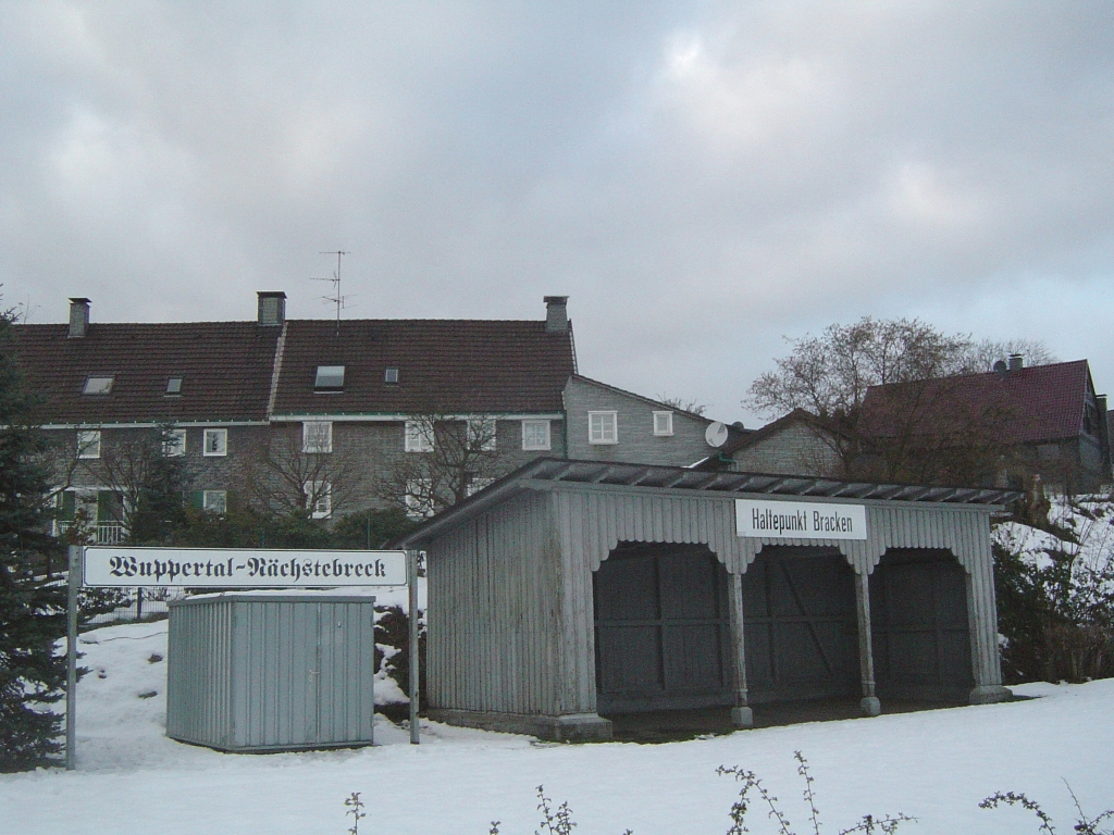 Der Haltepunkt Bracken an der ehemaligen Bahnstrecke Wichlinghausen-Hattingen in Wuppertal-Nächstebreck selbst fotografiert von Pitichinaccio, 03-12-2005